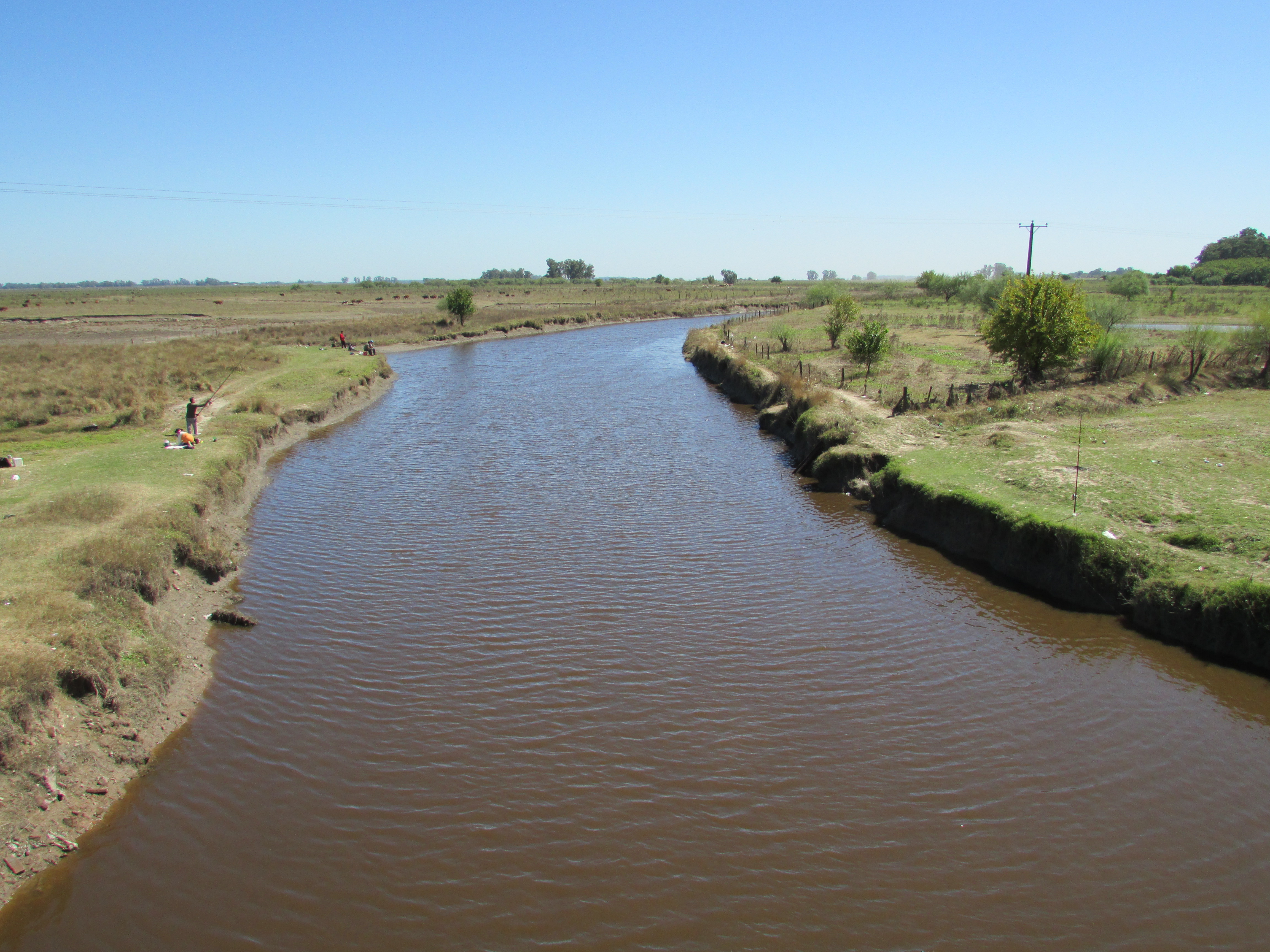 Río Samborombón desde la Autovía 2 en el partido de Brandsen, provincia de Buenos Aires, Argentina.